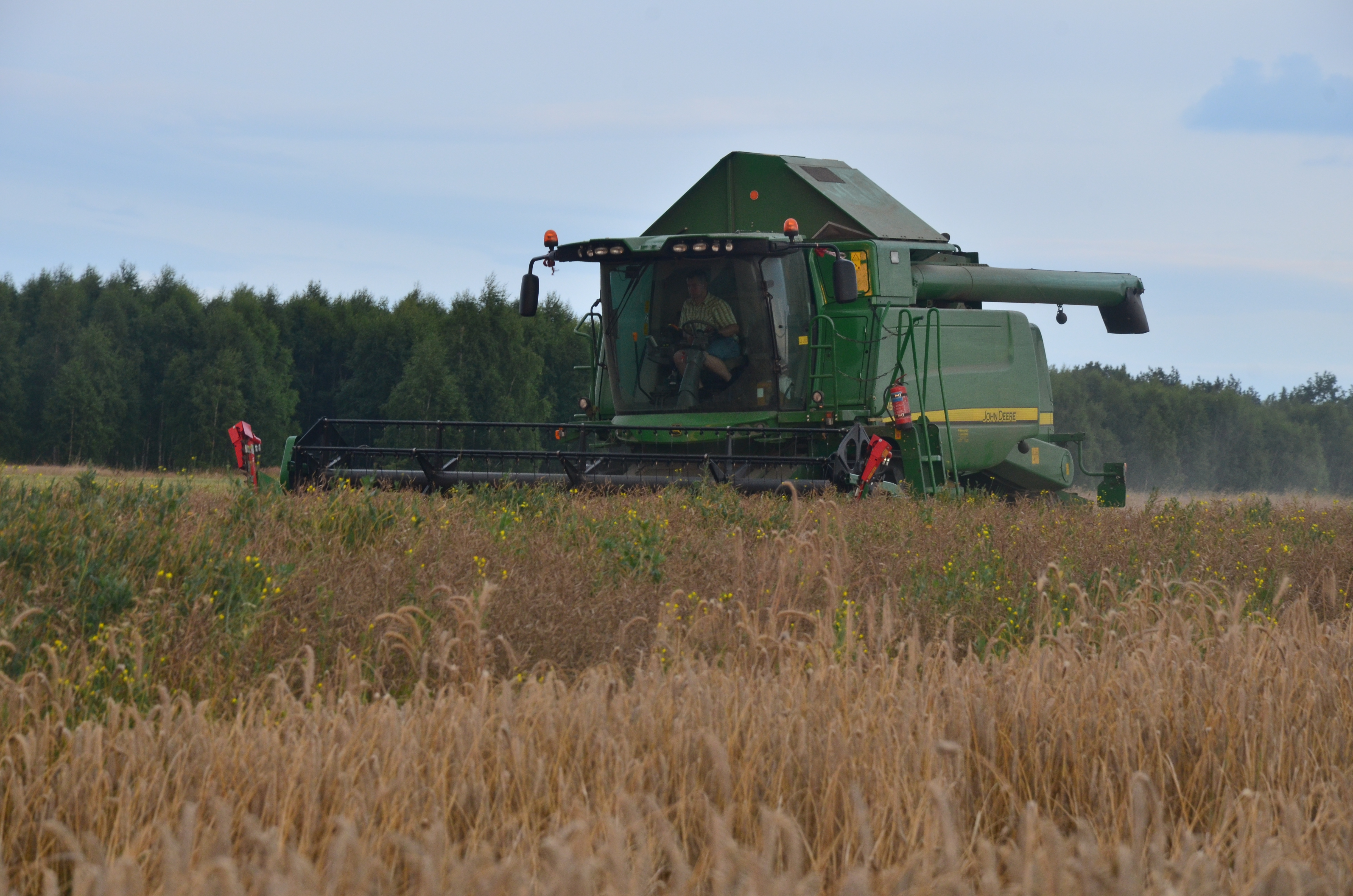 Zdjęcie przedstawia żniwa rzepaku kombajnem John Deere W540.